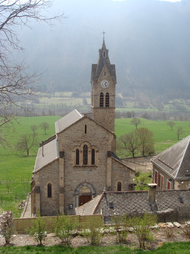 L'église paroissiale de Valbonnais (Isère), façade et clocher.